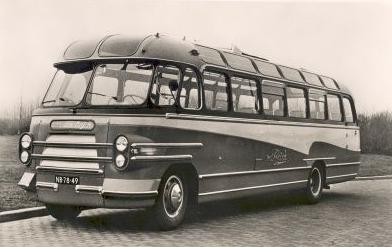 NB-78-49